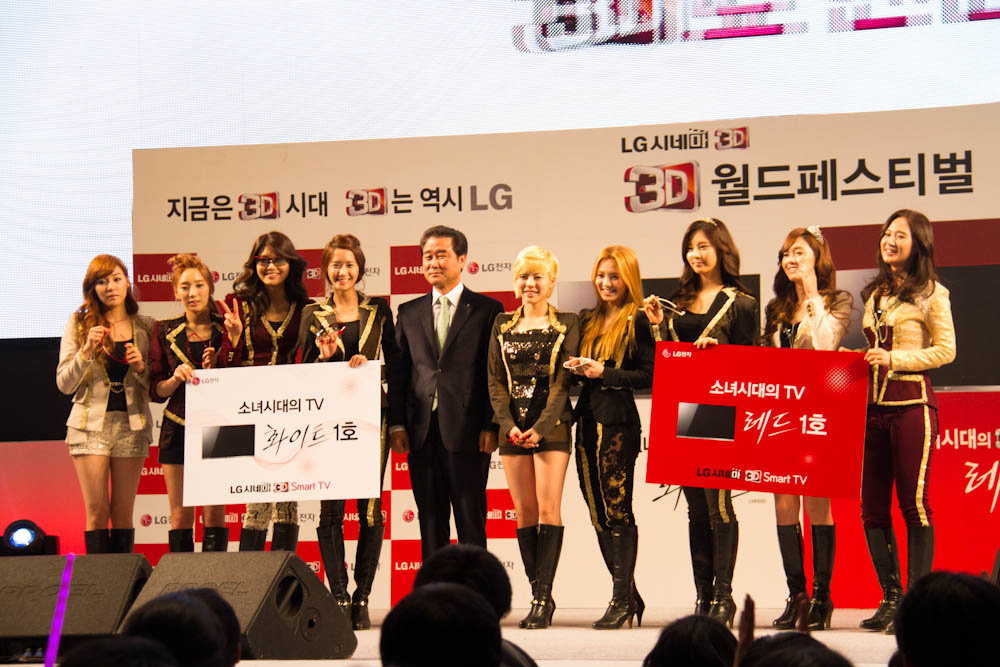 Lg전자가 3월 31일, 4월 1일 양일간 서울 잠실동 롯데월드 아이스링크에서 'lg 시네마3d 월드페스티벌'을 성황리에 개최했다. ※ LG전자 뉴스룸 에서 관련 보도자료를 확인실 수 있습니다.